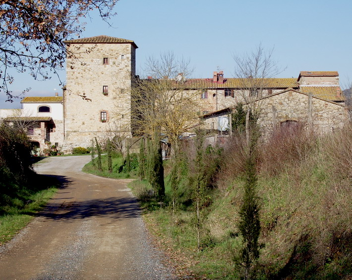 L'antico Castello di Casallia (ex convento), noto anche con la denominazione Le Case di Vetulonia (GR)